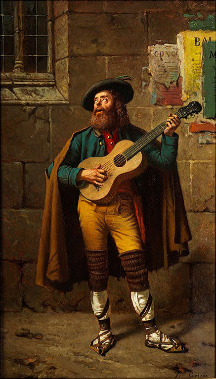 Straßensänger